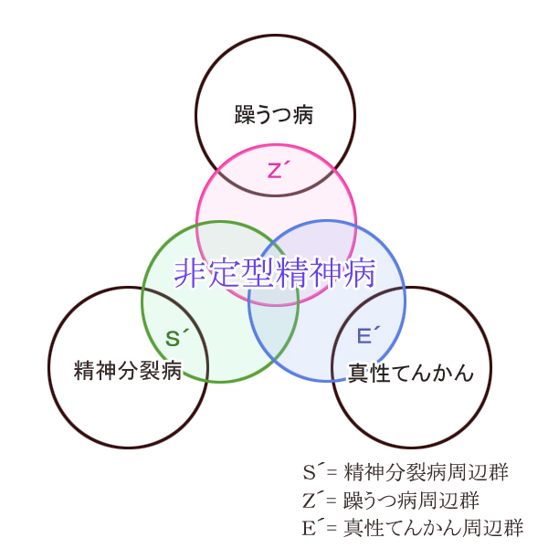 満田の類型別にみた各遺伝図の関係（堺による簡便図 1981）